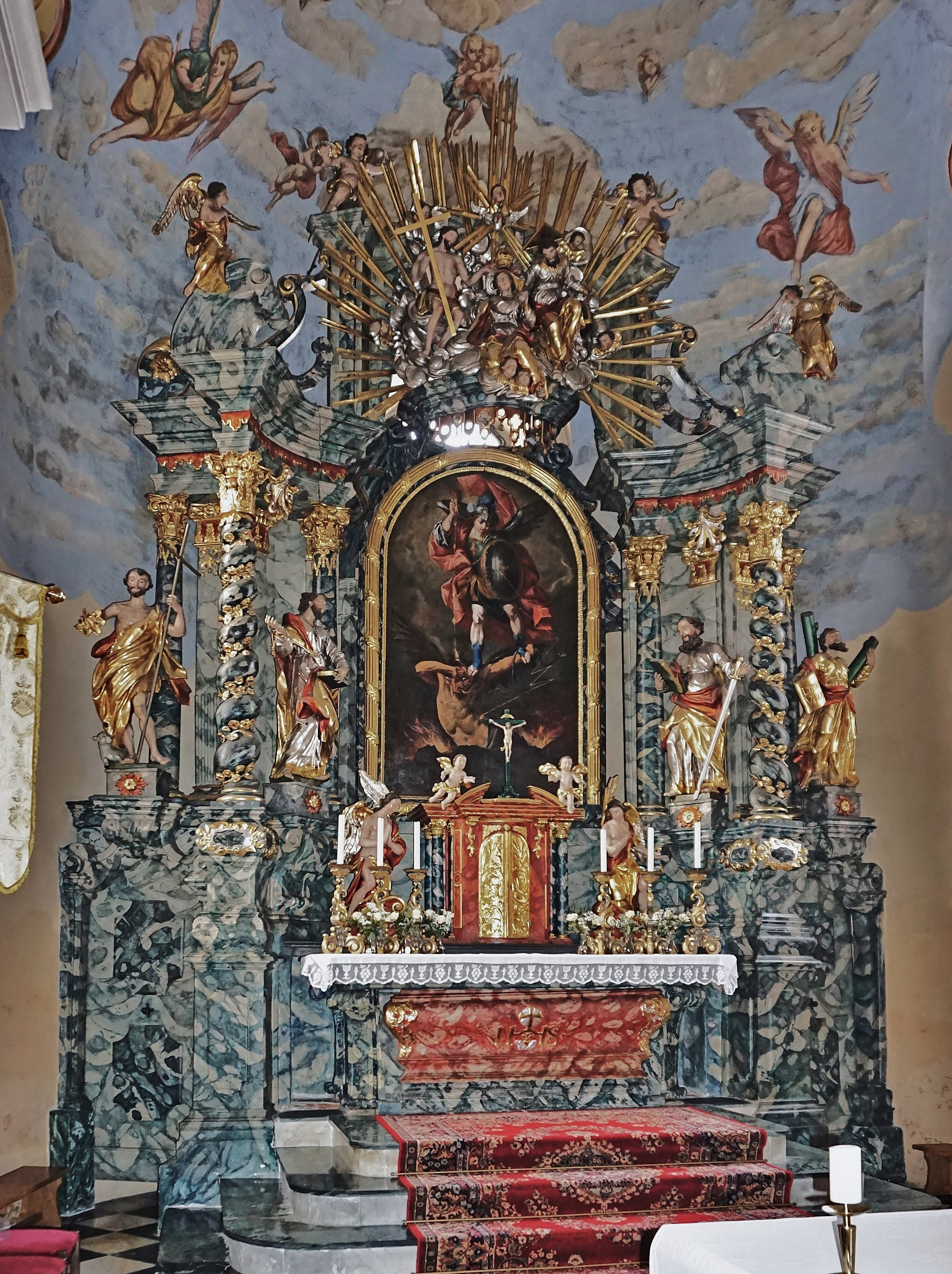 Kath. Pfarrkirche Hl. Michael und Hl. Georg Moosburg (Kärnten), der barocke Hochaltar